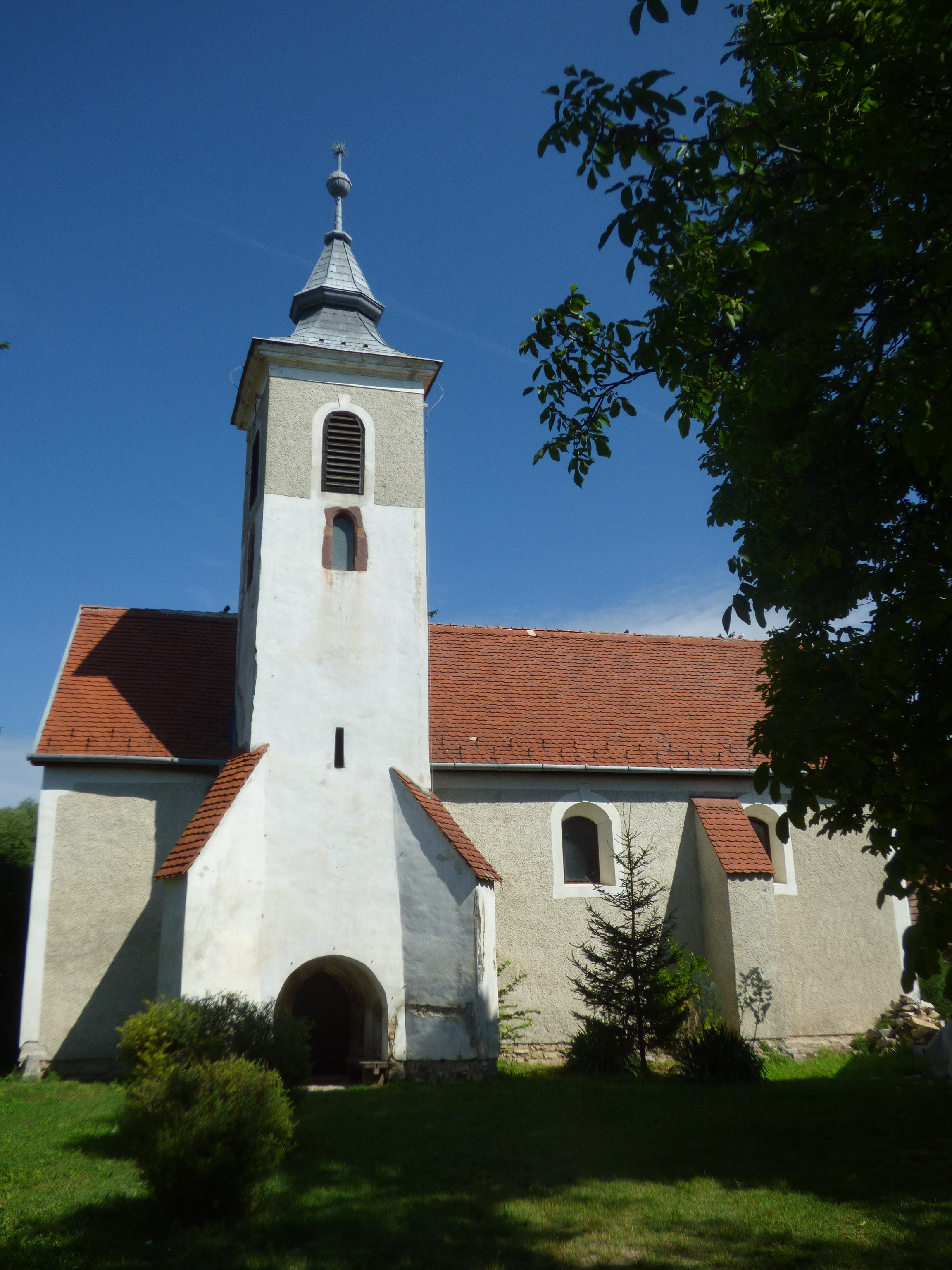 Balatonszőlős, a református templom bejárata